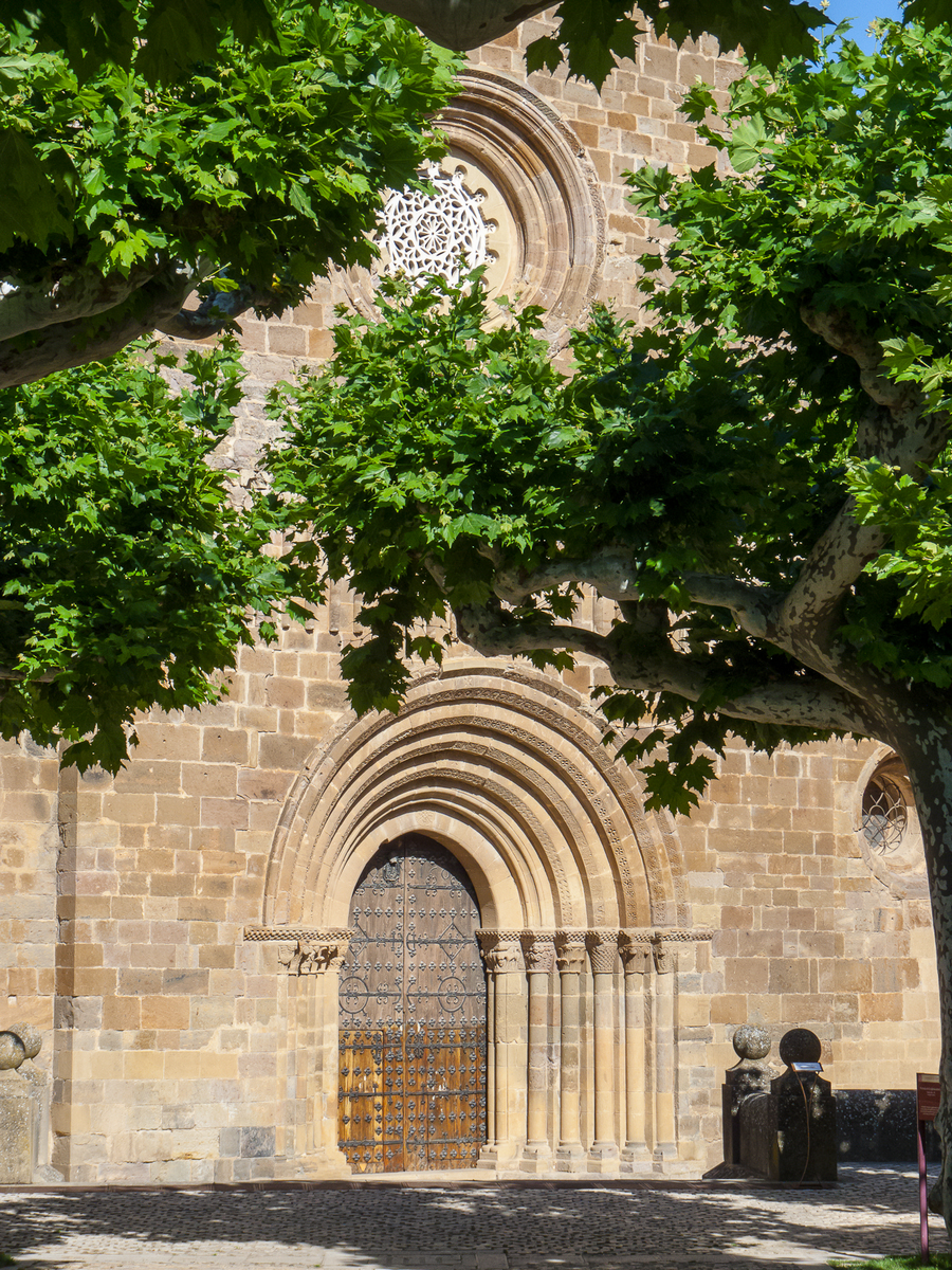 Monasterio de Veruela 31